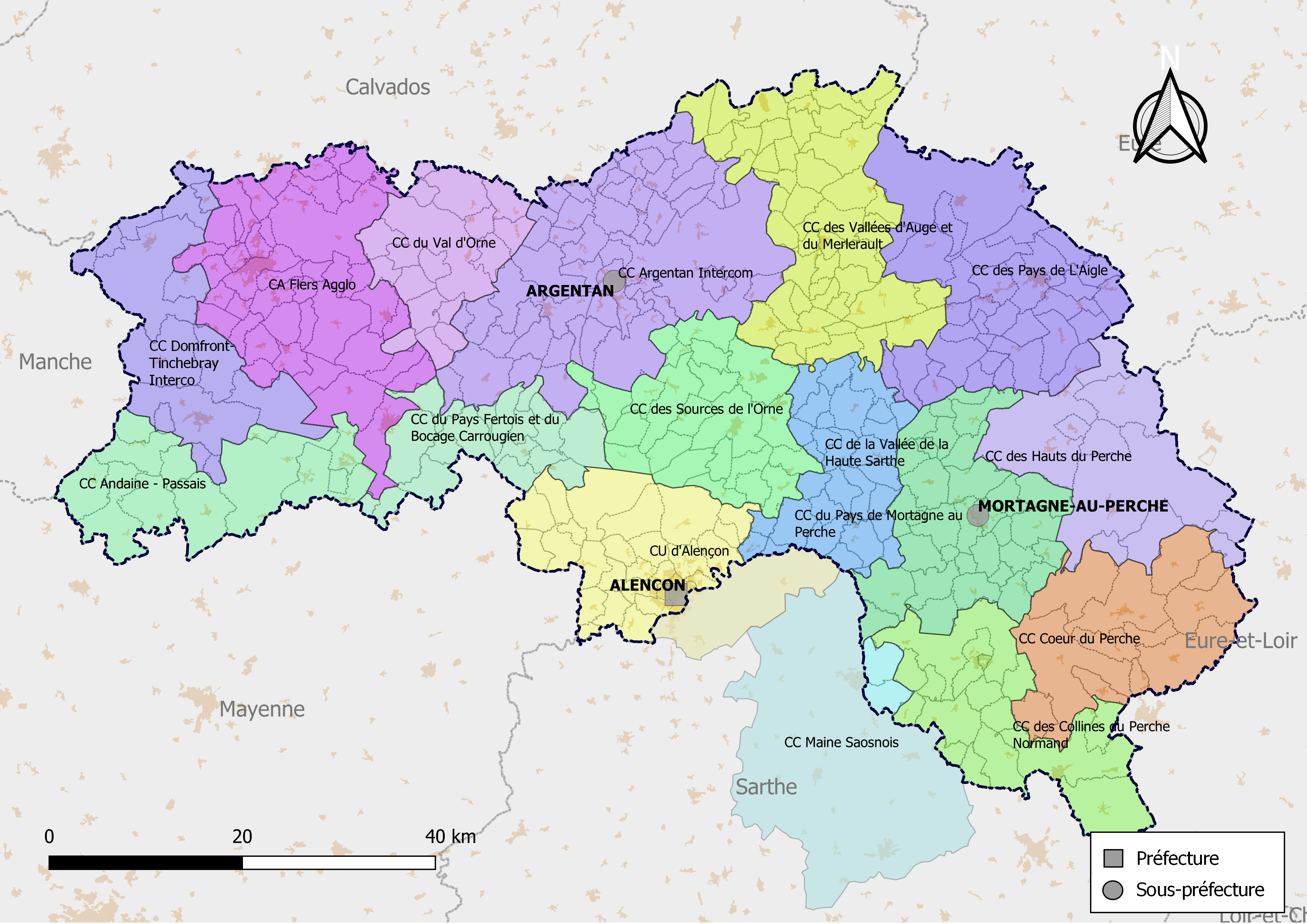 Carte des intercommunalités du département de l'Orne, France. Composition au 1er janvier 2019.